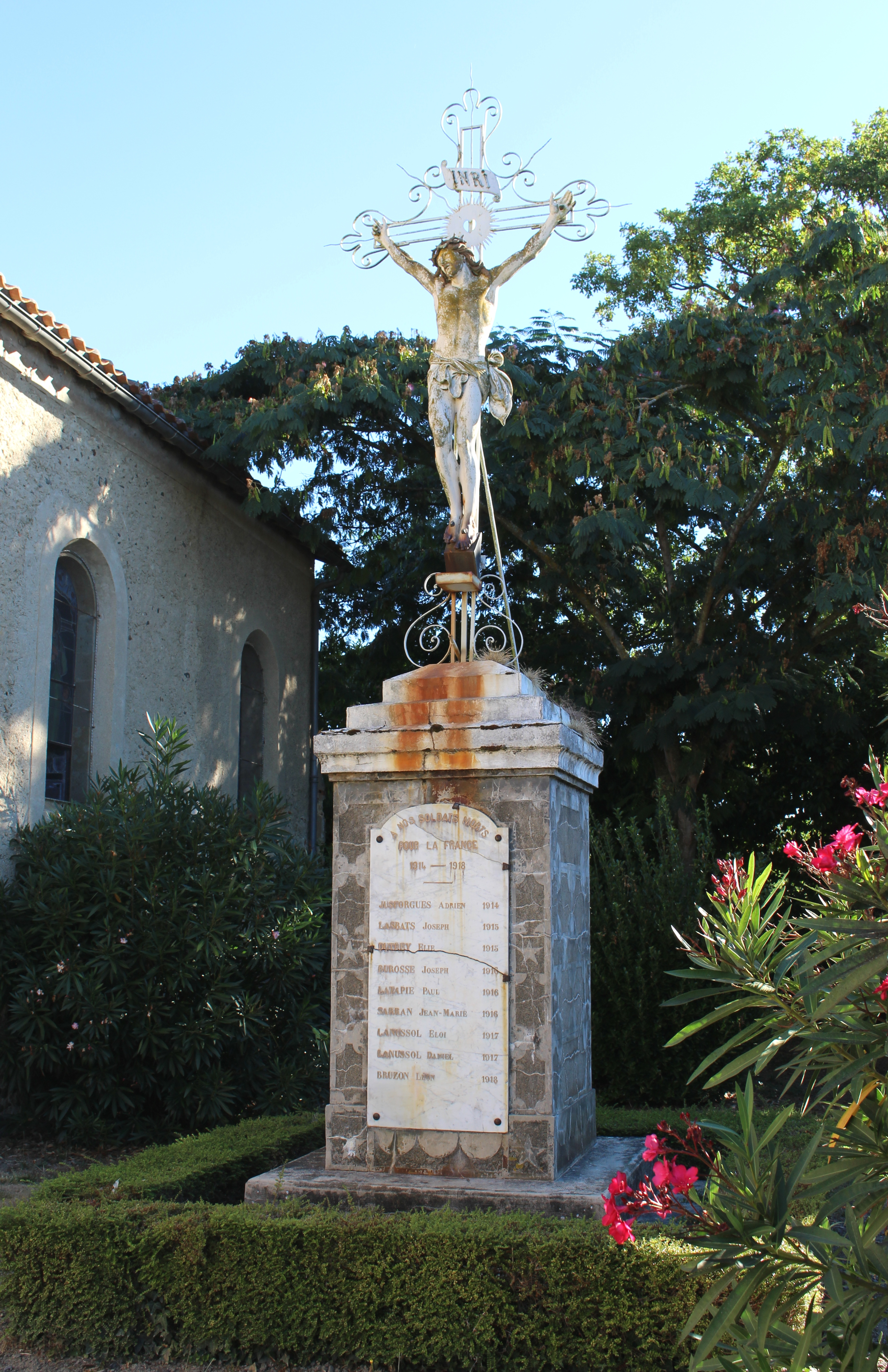 Monument aux morts de Hères (Hautes-Pyrénées)